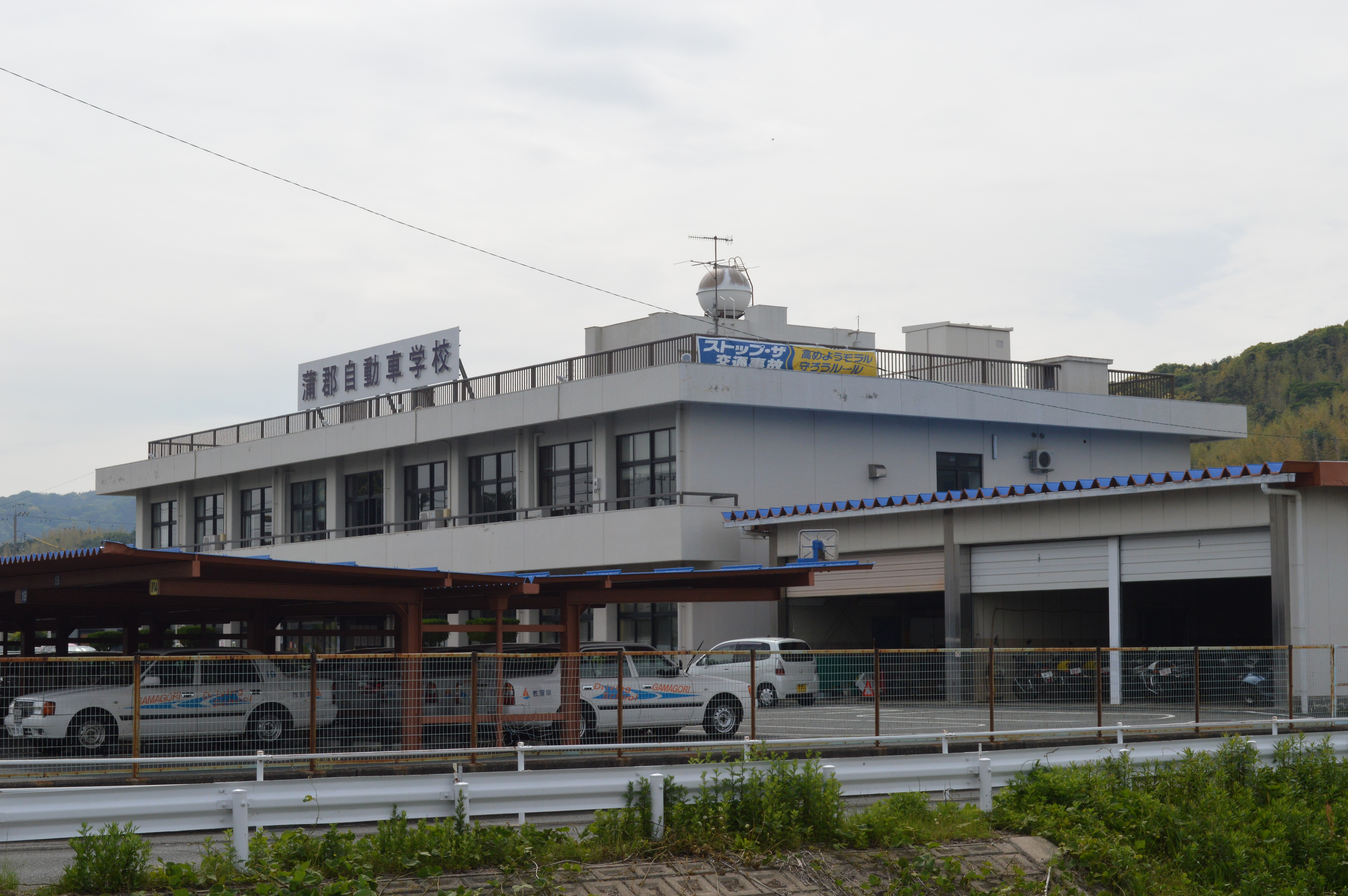 愛知県蒲郡市にある蒲郡自動車学校。